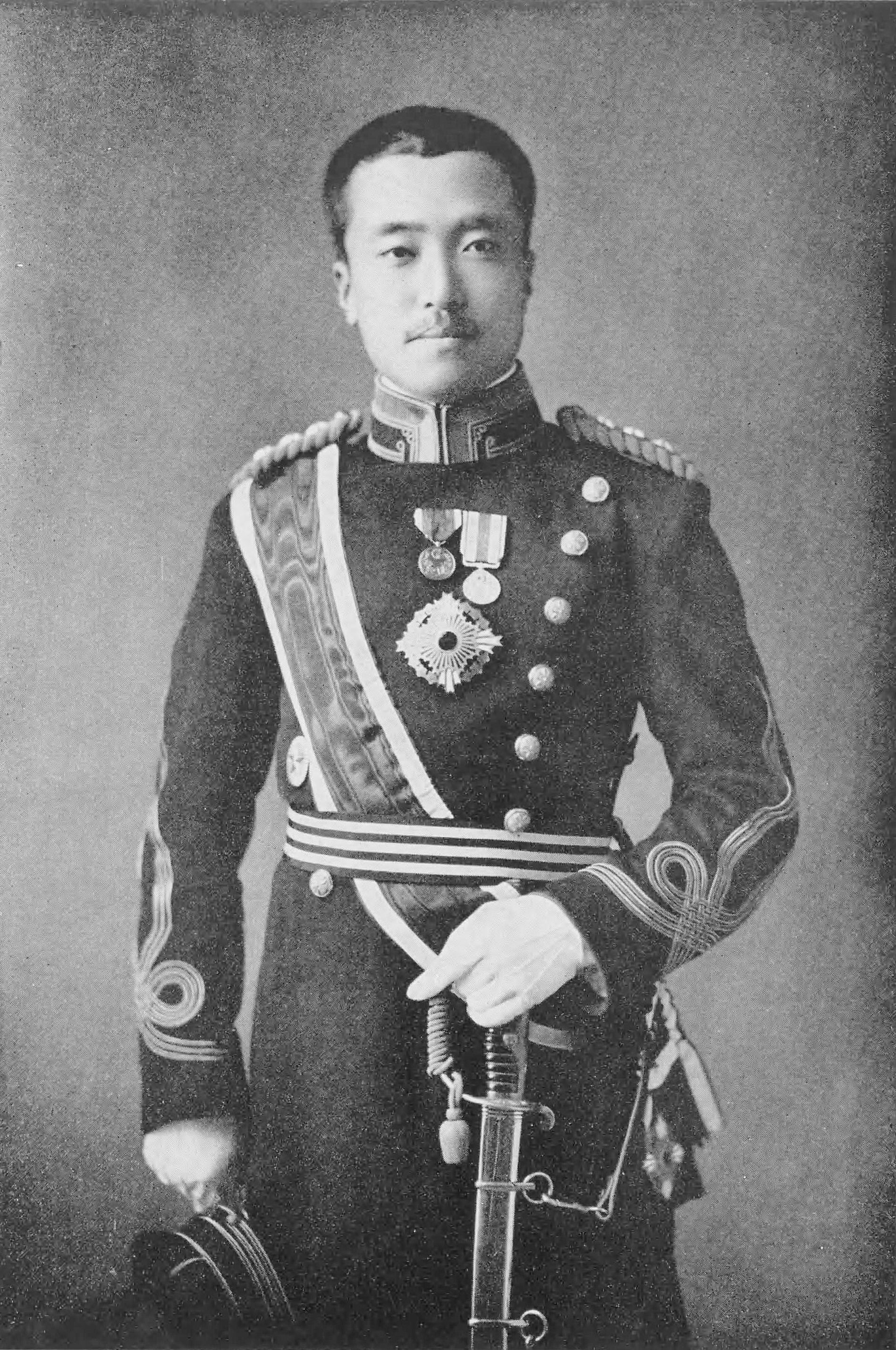 東久邇宮稔彦王（1887年 - 1990年）